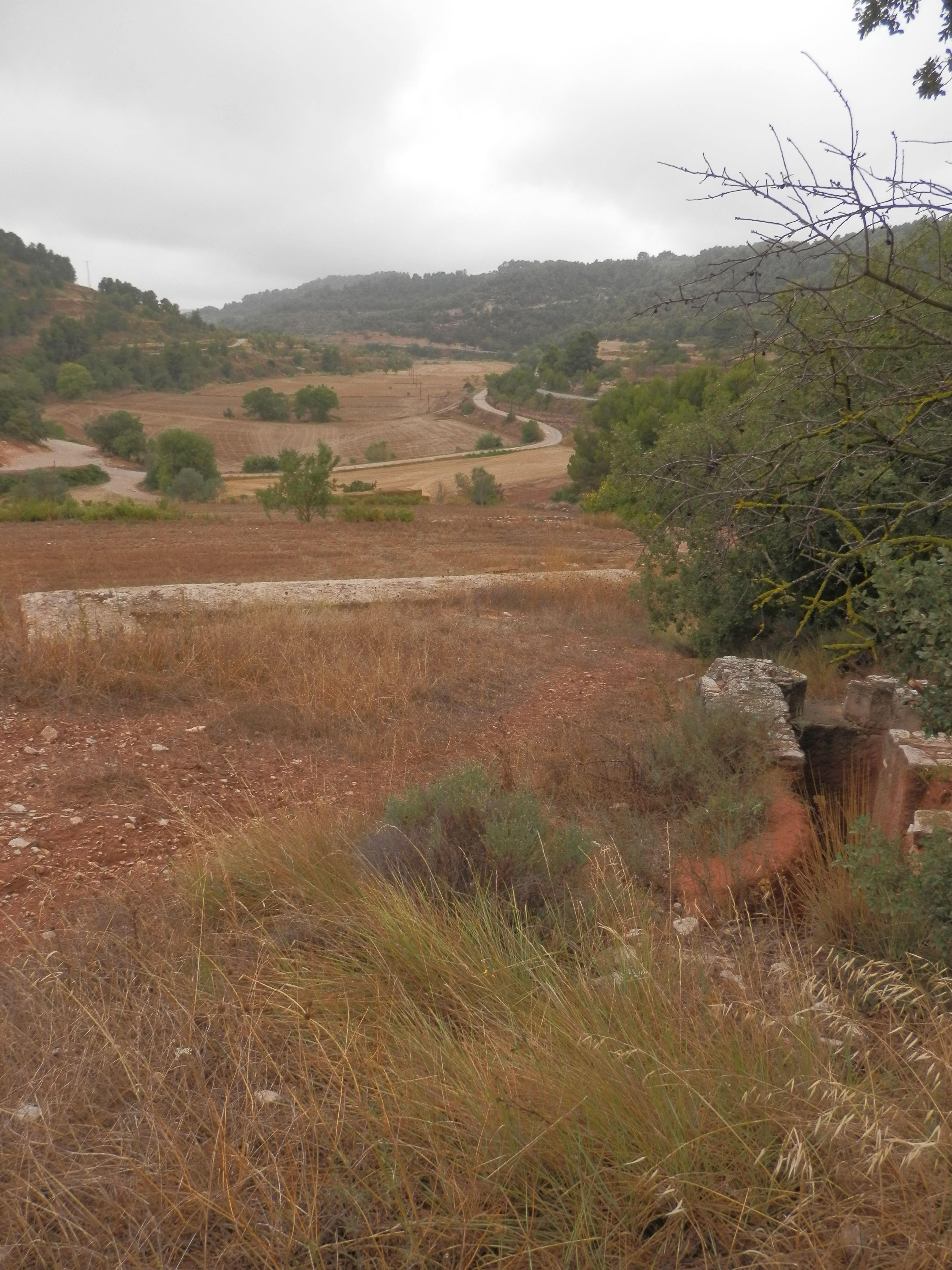 View of the valley from the shelter and the rifleman nest.